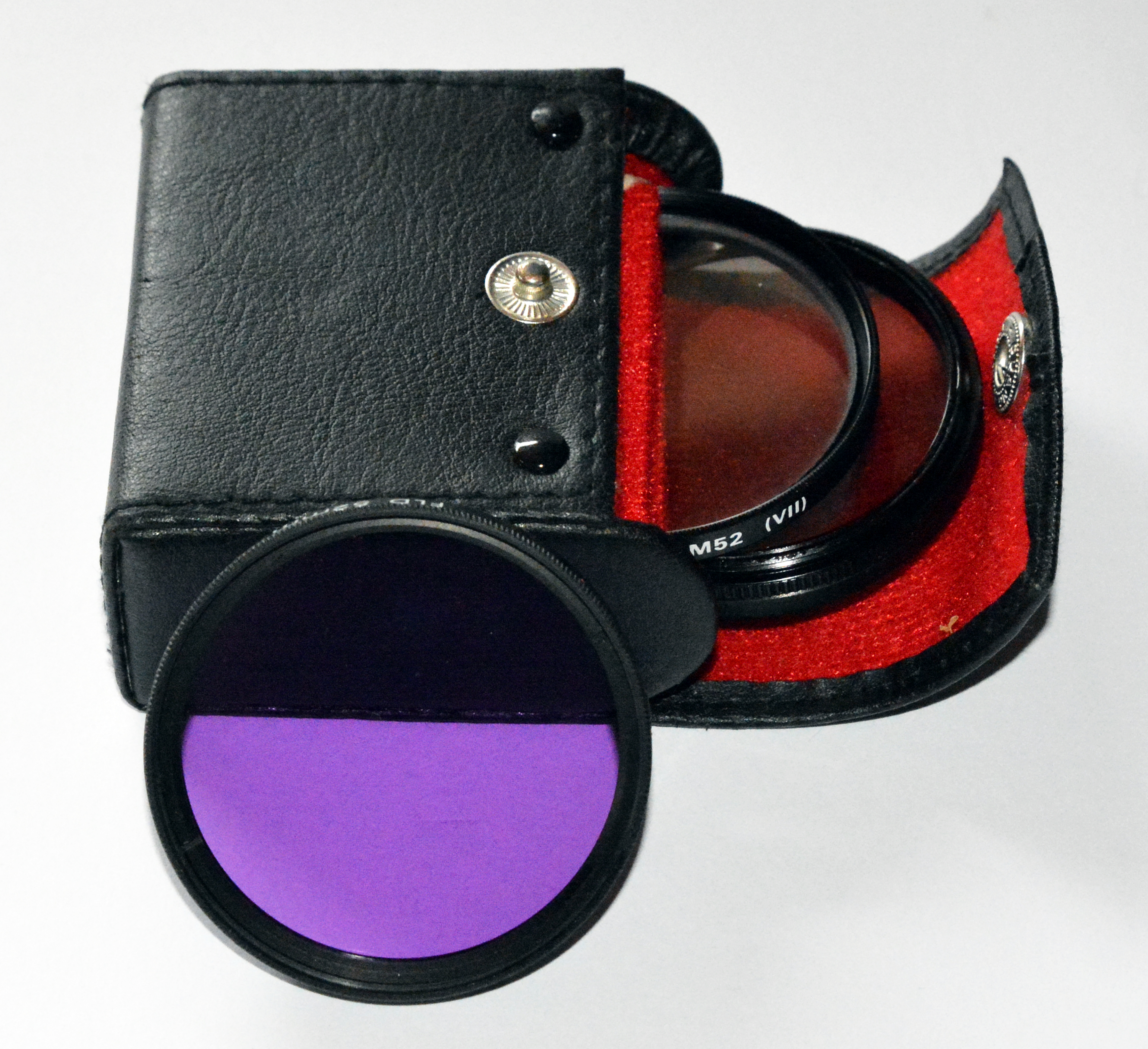 Verschiedene Objektivfilter mit Ledertasche